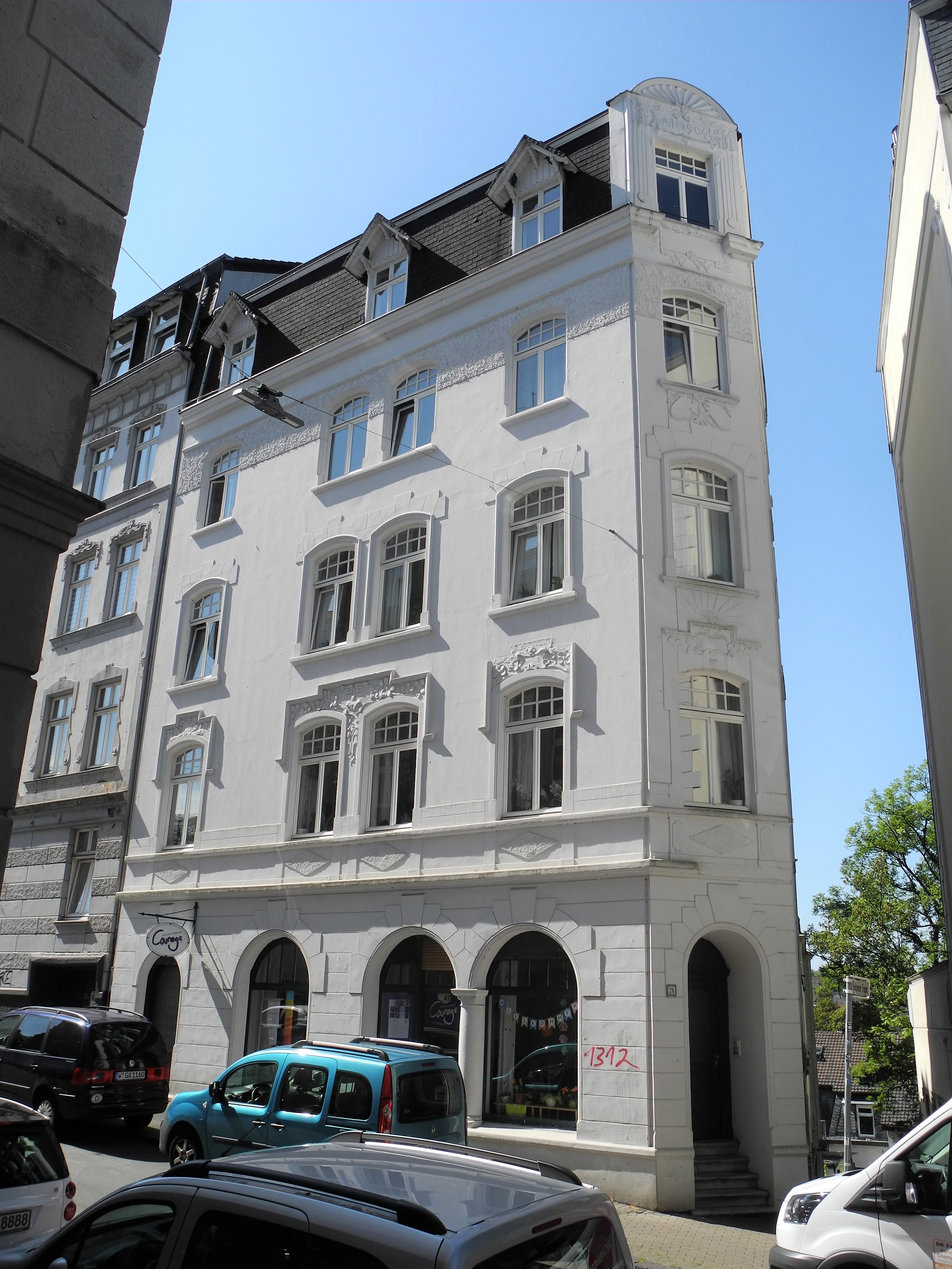 Wuppertal, Wohnquartier Ostersbaum, Holsteiner Str. 28